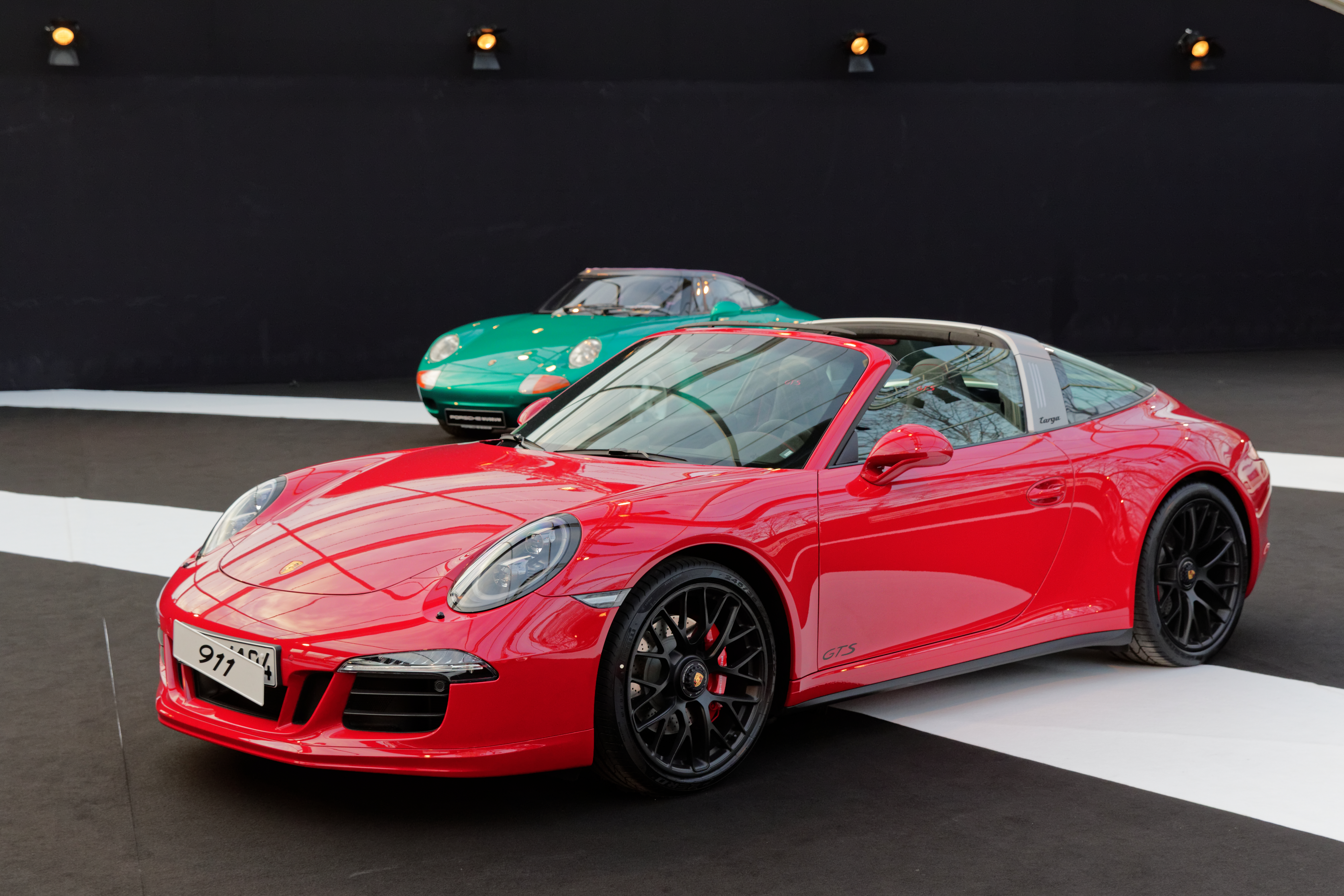 La Porsche 911 Targa exposée lors du festival automobile international 2015.